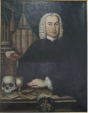 Hatvani István orvosdoktor, matematikus, bűvész, a debreceni Kollégium tanára.